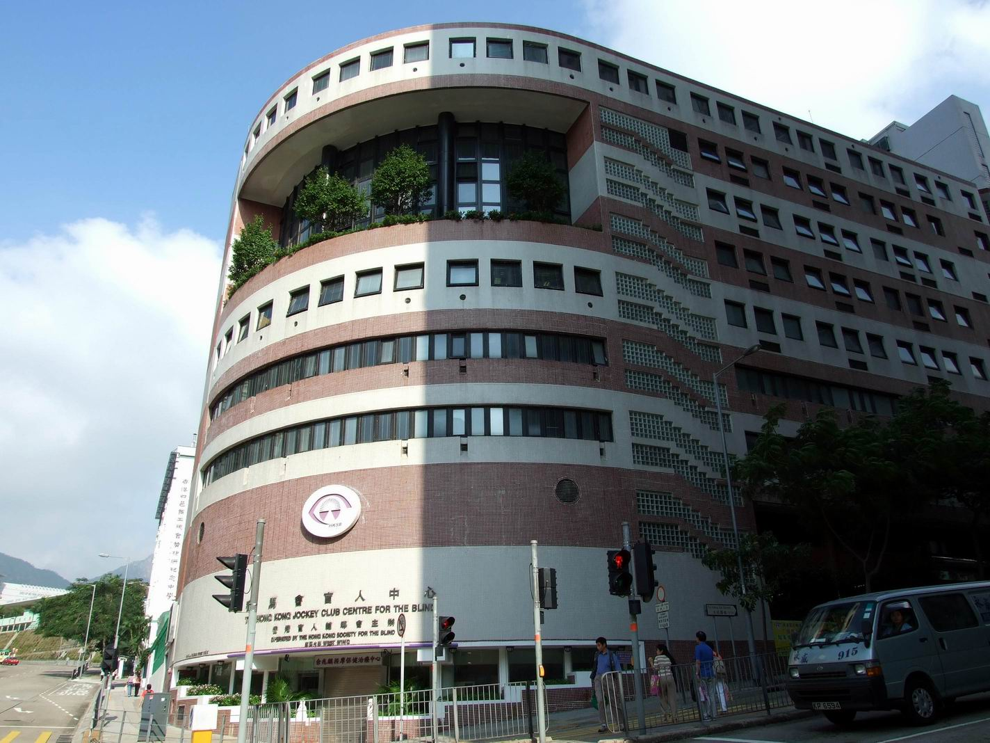 香港盲人輔導會賽馬會視障人士綜合服務中心